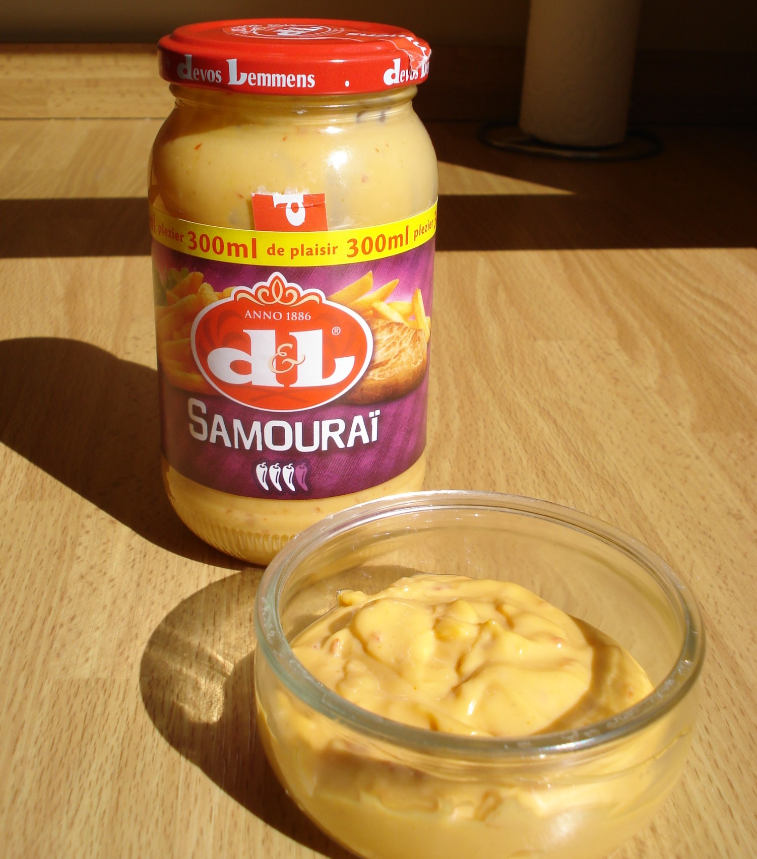 Sauce belge piquante